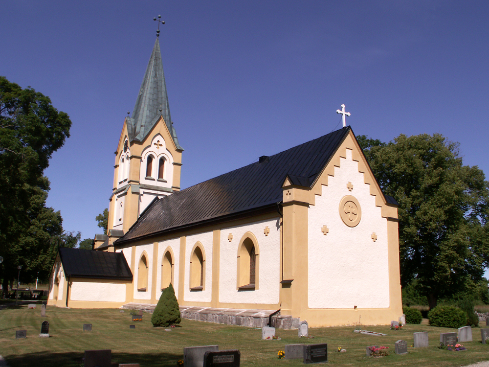 Helgarö kyrka